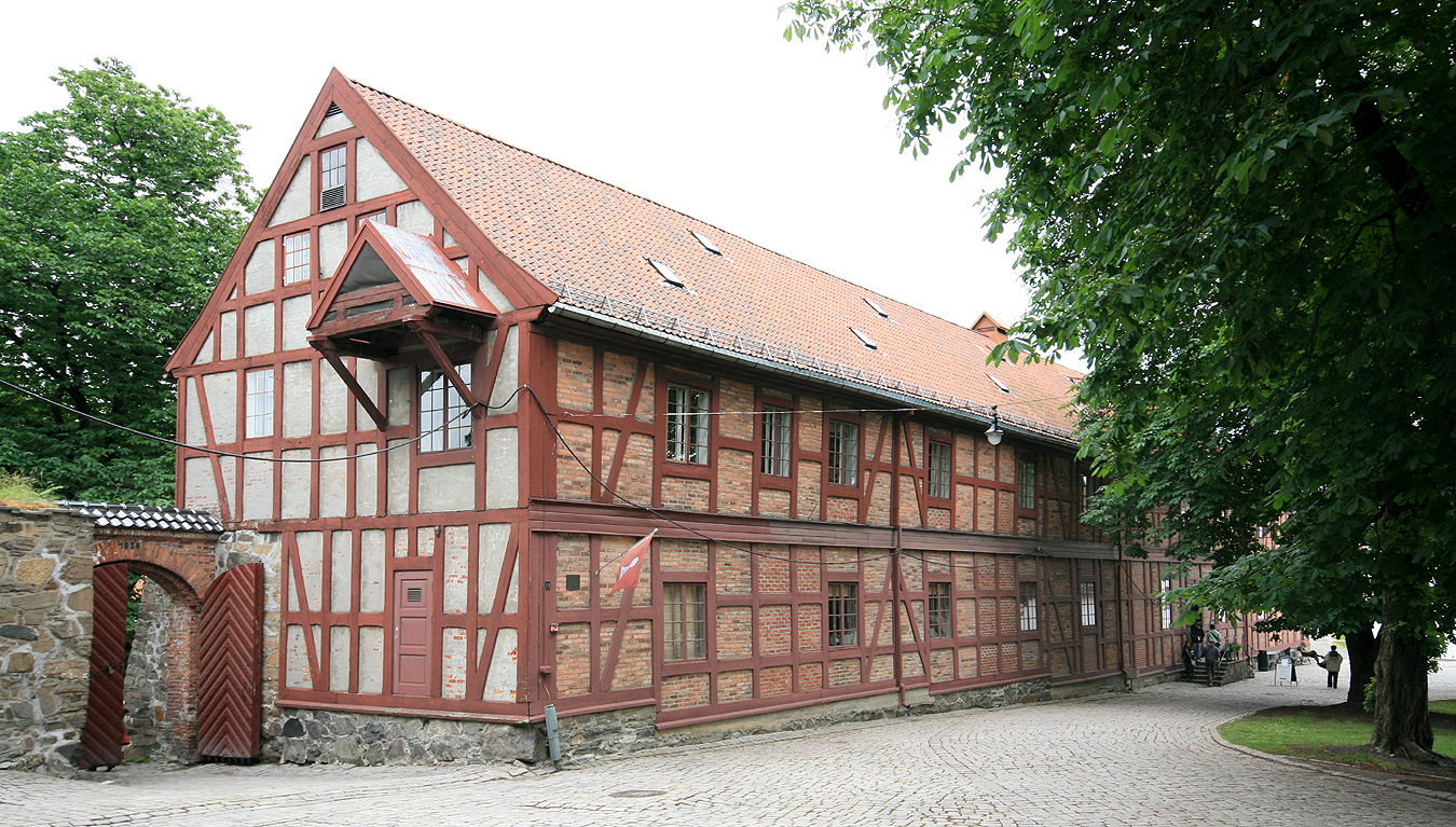 Artilleribygningen (Det lange røde hus), Akershus festning, Oslo. Bygd 1774.